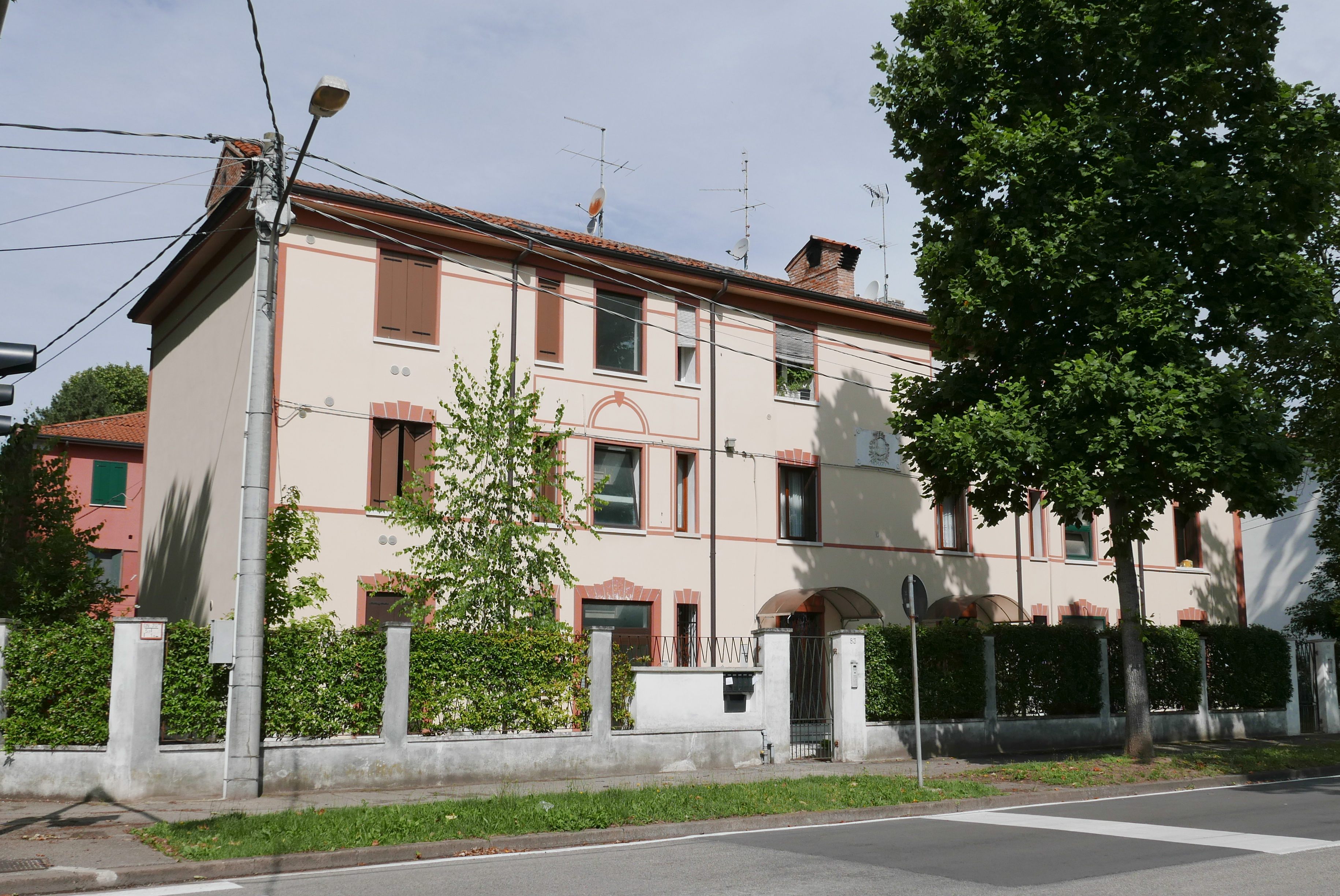 Case popolari inizio Novecento a San Bortolo (Vicenza)